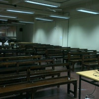 Interior de un aula grande de la facultad.